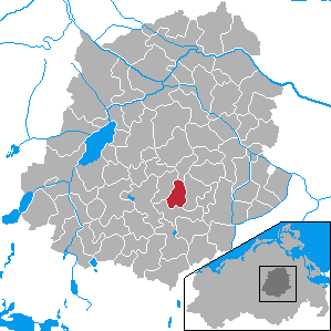 Röckwitz, Landkreis Demmin, Mecklenburg-Vorpommern